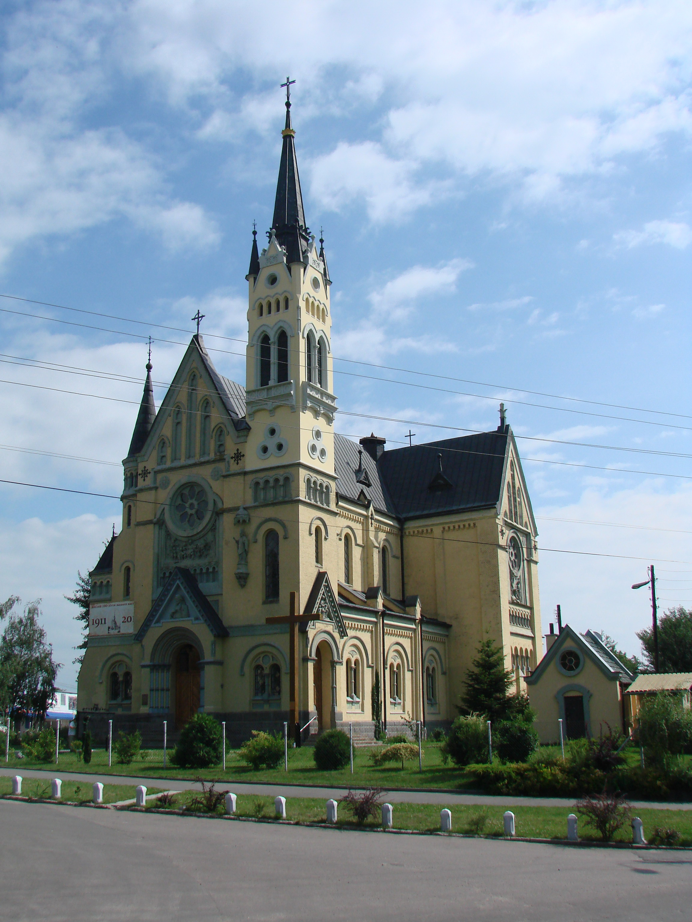 Костел святого Миколая у Фастові (Київська область, Україна).